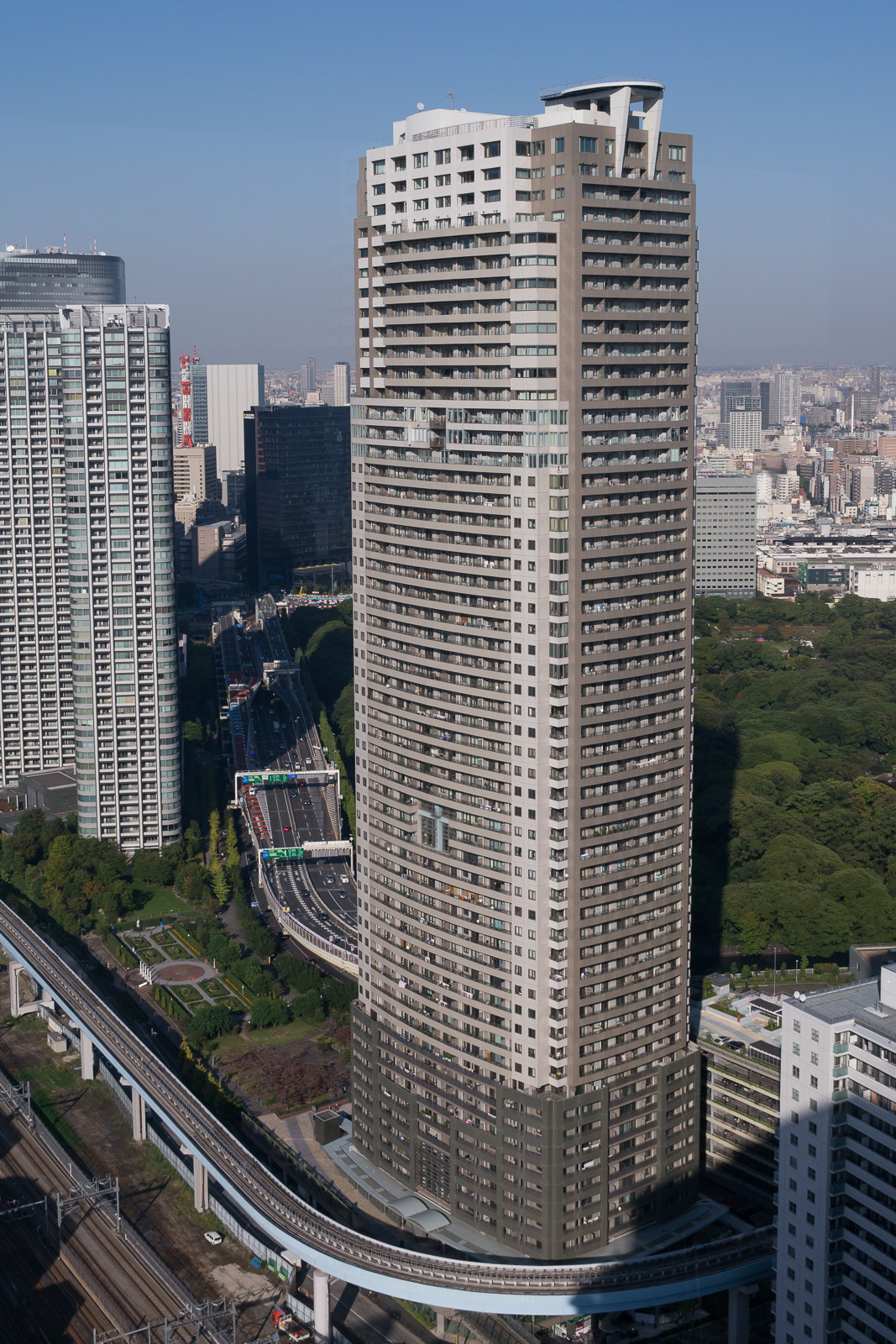 アクティ汐留、東京都港区海岸1丁目。